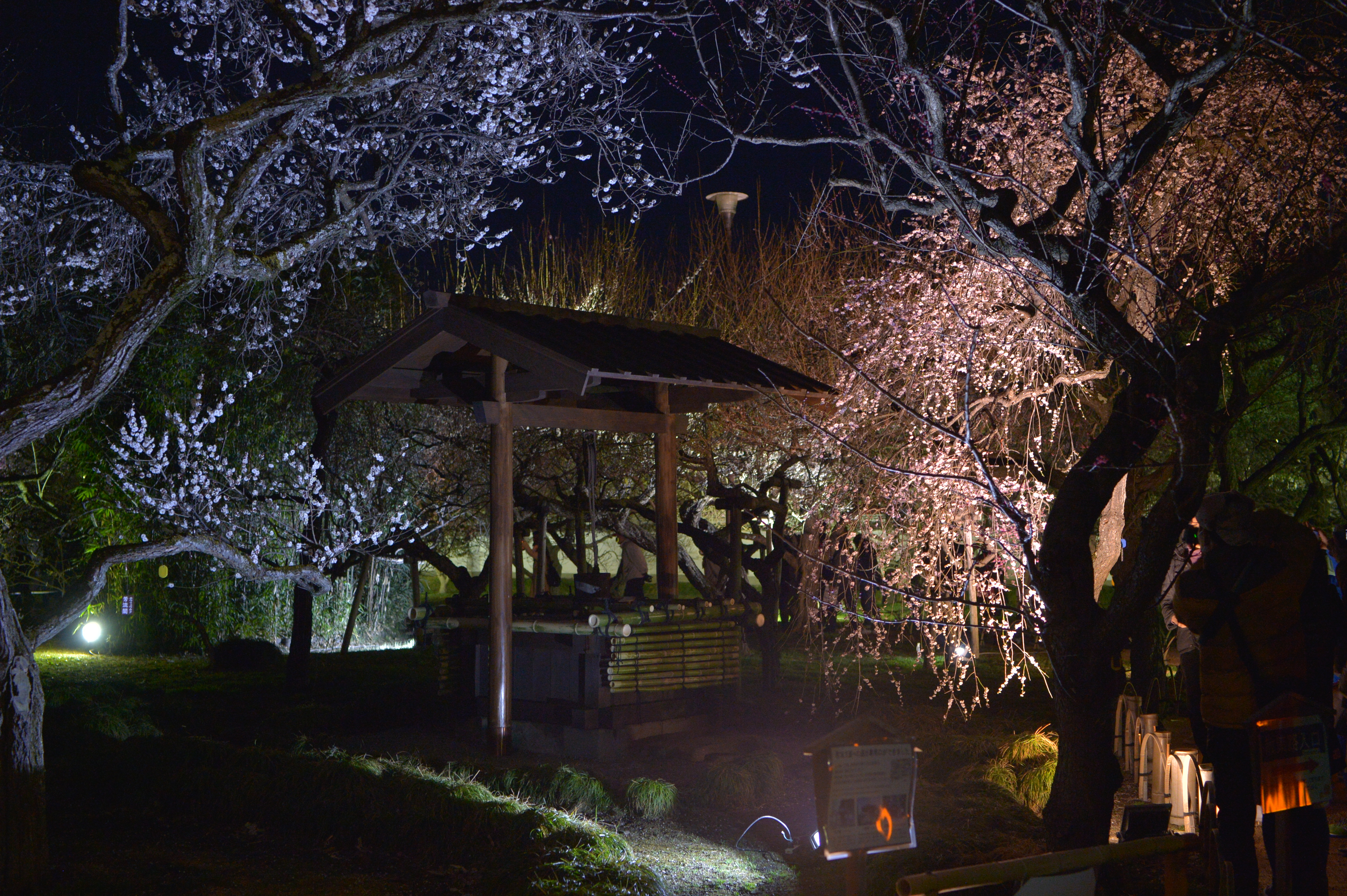 2019年・夜梅祭 第一夜（弘道館）の庭園内でライトアップされた梅花 Nikon Df